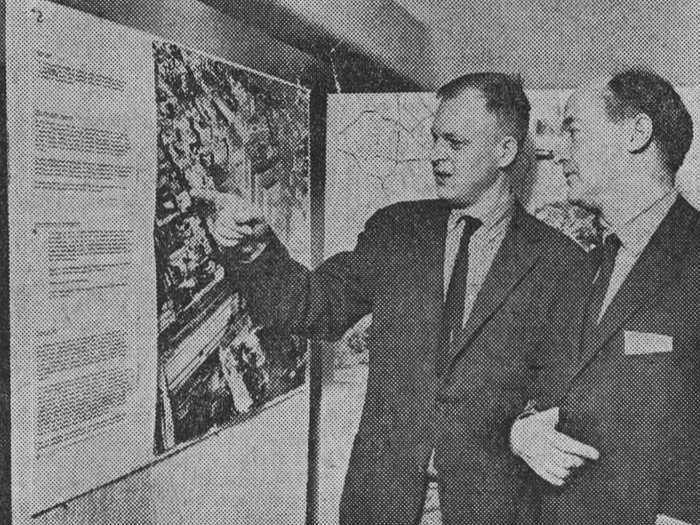 Arkitekterna Allan Westerman och Folke Löfström studerar flygfoto över Stockholms city